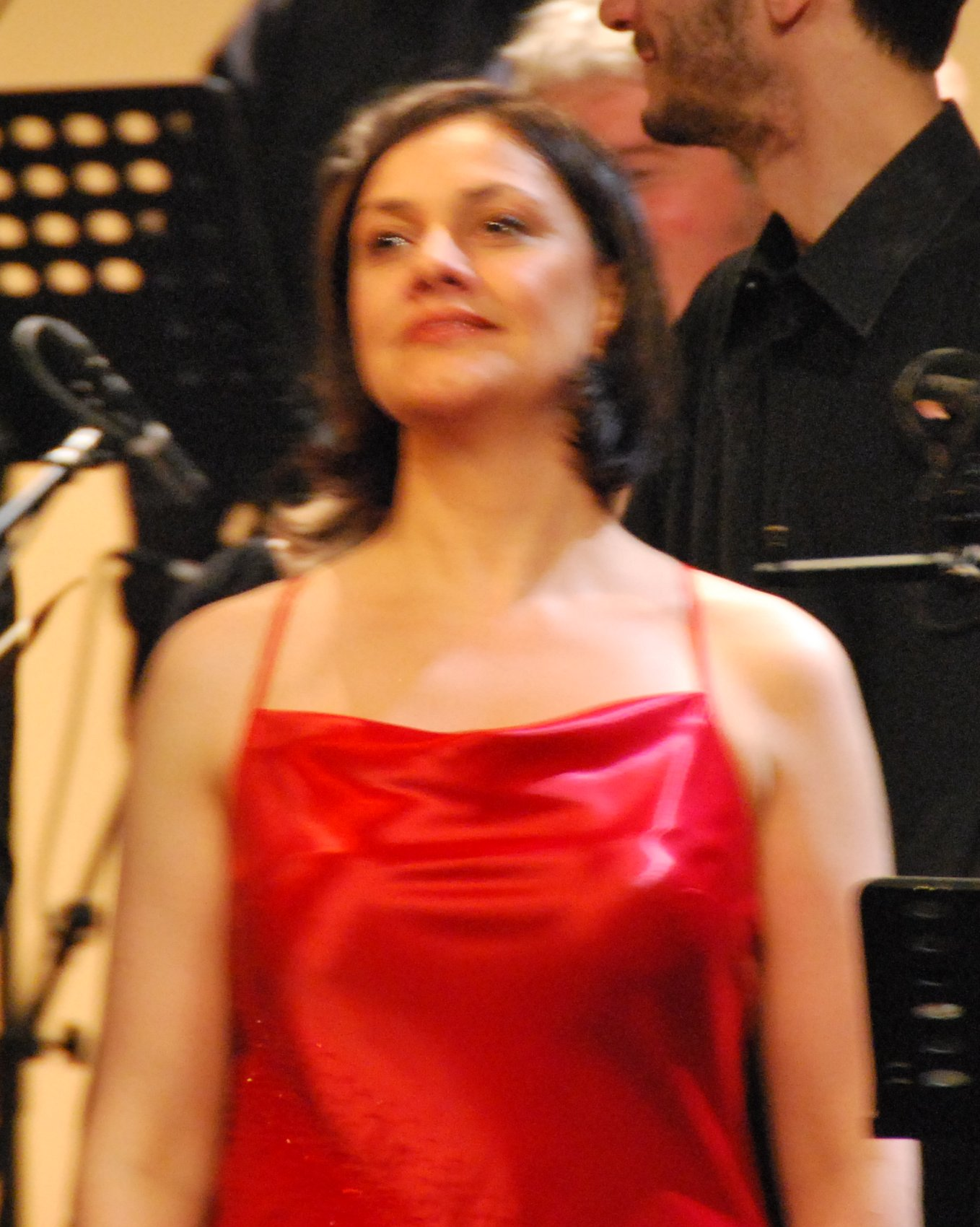 Roberta Invernizzi podczas koncertu w Teatrze im. Słowackiego w Krakowie w ramach festiwalu Opera Rara, 18.12.2009